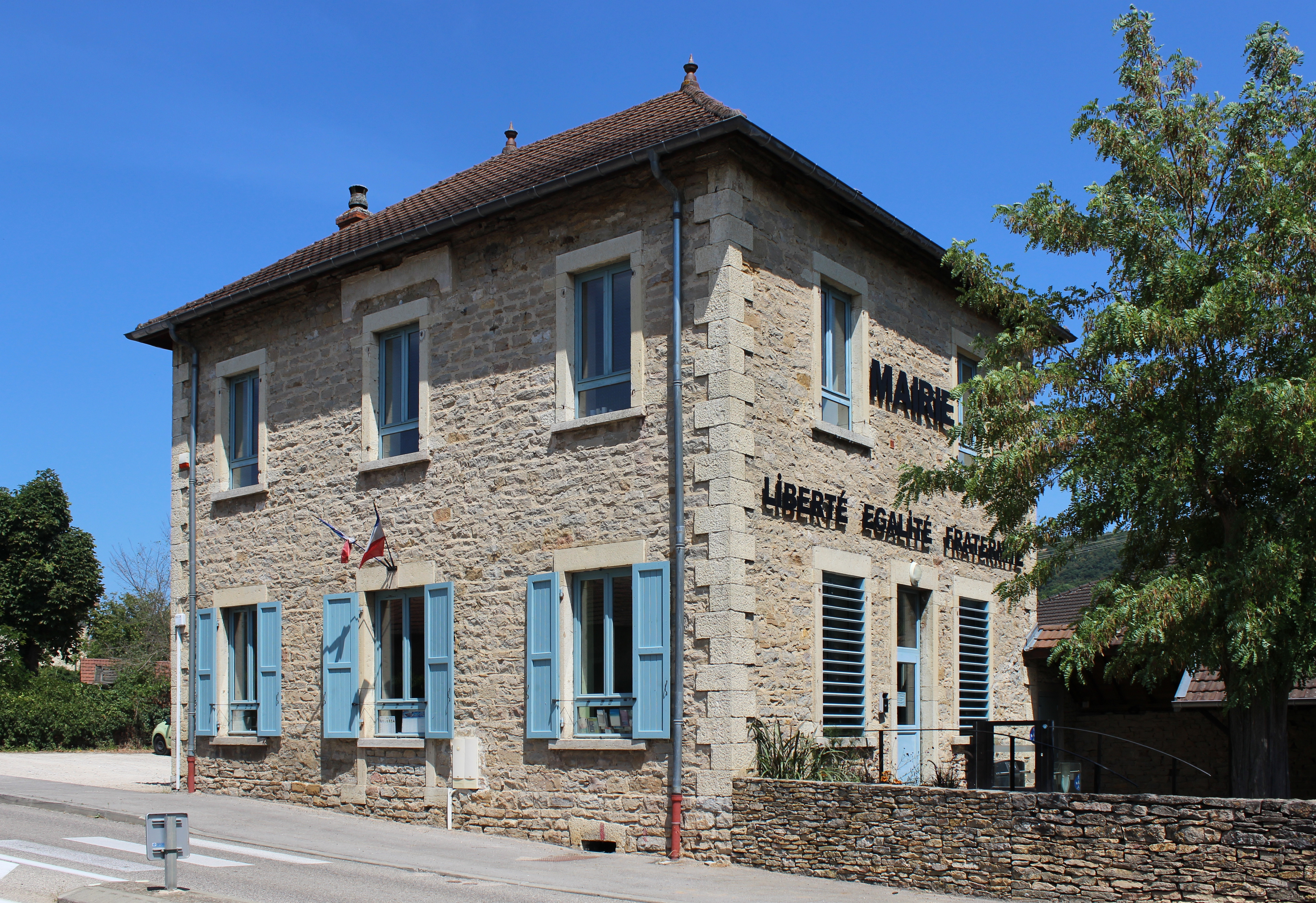 Mairie de Leyrieu (Isère).